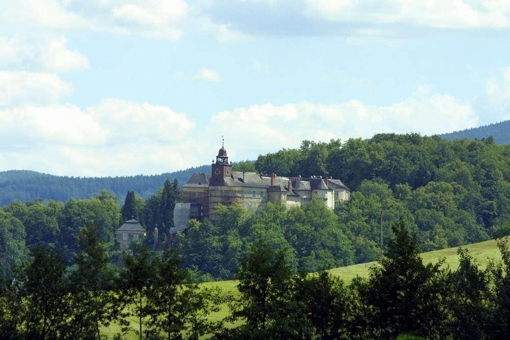 Zamek biskupów wrocławskich Jánský Vrch w Javorníku